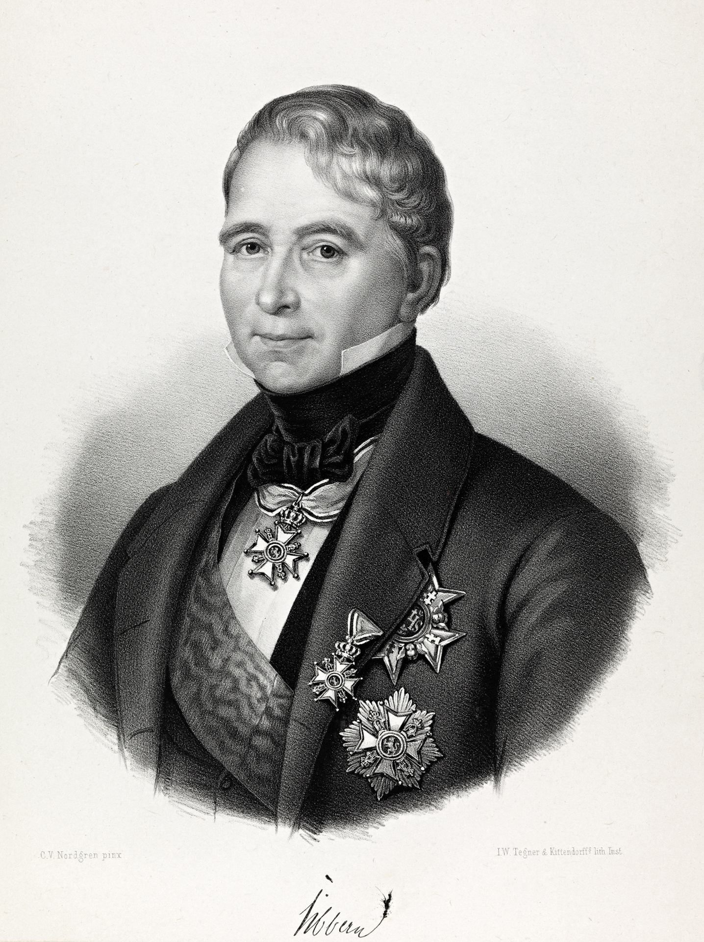 Tittel / Title: Portrett av Valentin Sibbern (1779-1853) Beskrivelse / Description: Litografi. Møtte på Riksforsamlingen 1814 som deputert for Akershusiske Jægerkorps, inntok en meget selvstendig stilling, men må nærmest regnes til unionspartiet (snl.no). Dato / Date: ukjent / unknown Kreditering / Credit: C. V. Nordgren pinx, I. W. Tegner & Kittendorfs lith. Inst. Eier / Owner Institution: Nasjonalbiblioteket / National Library of Norway Bildesignatur / Image Number: blds_04910